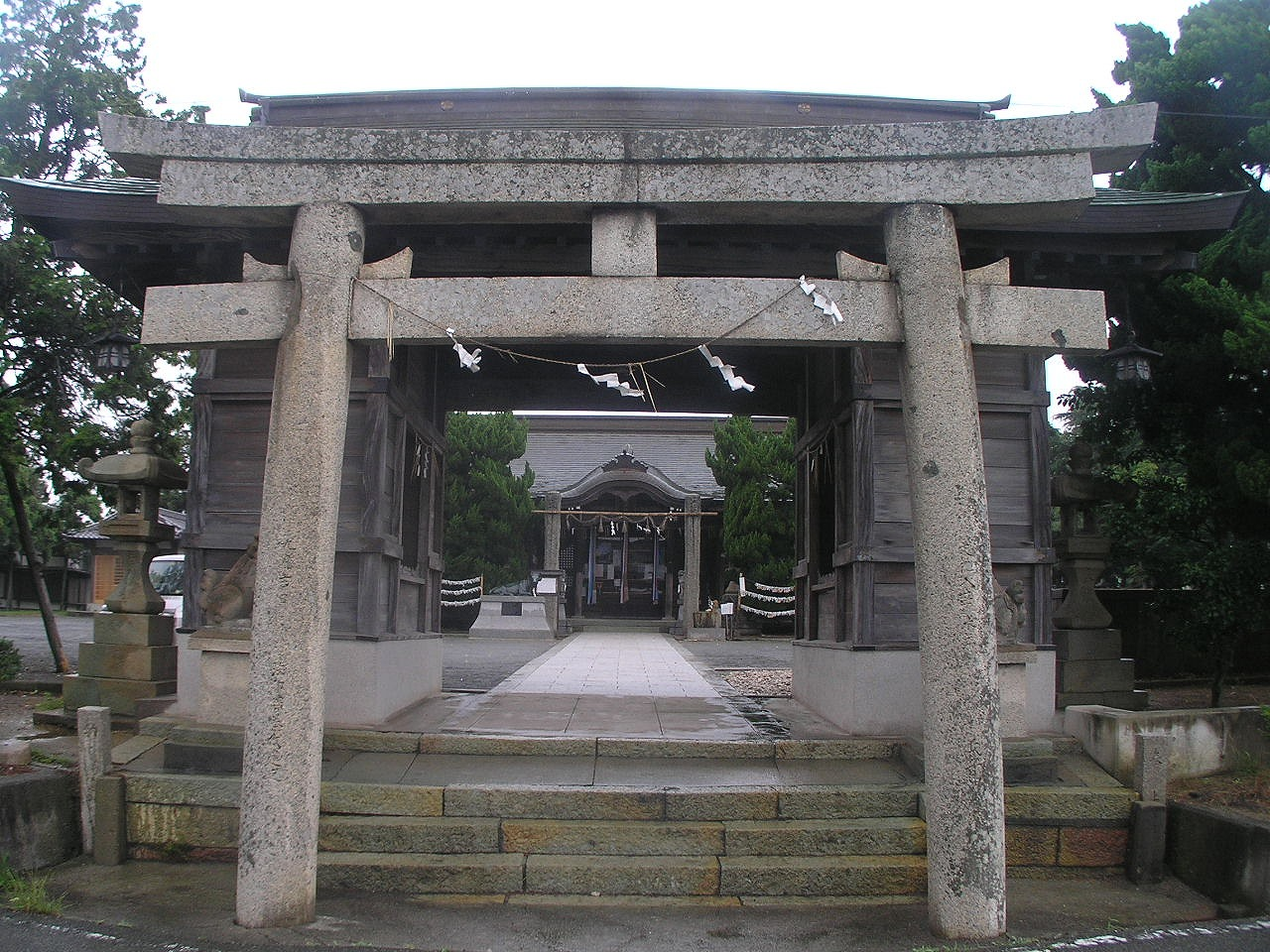 天満神社 兵庫県稲美町